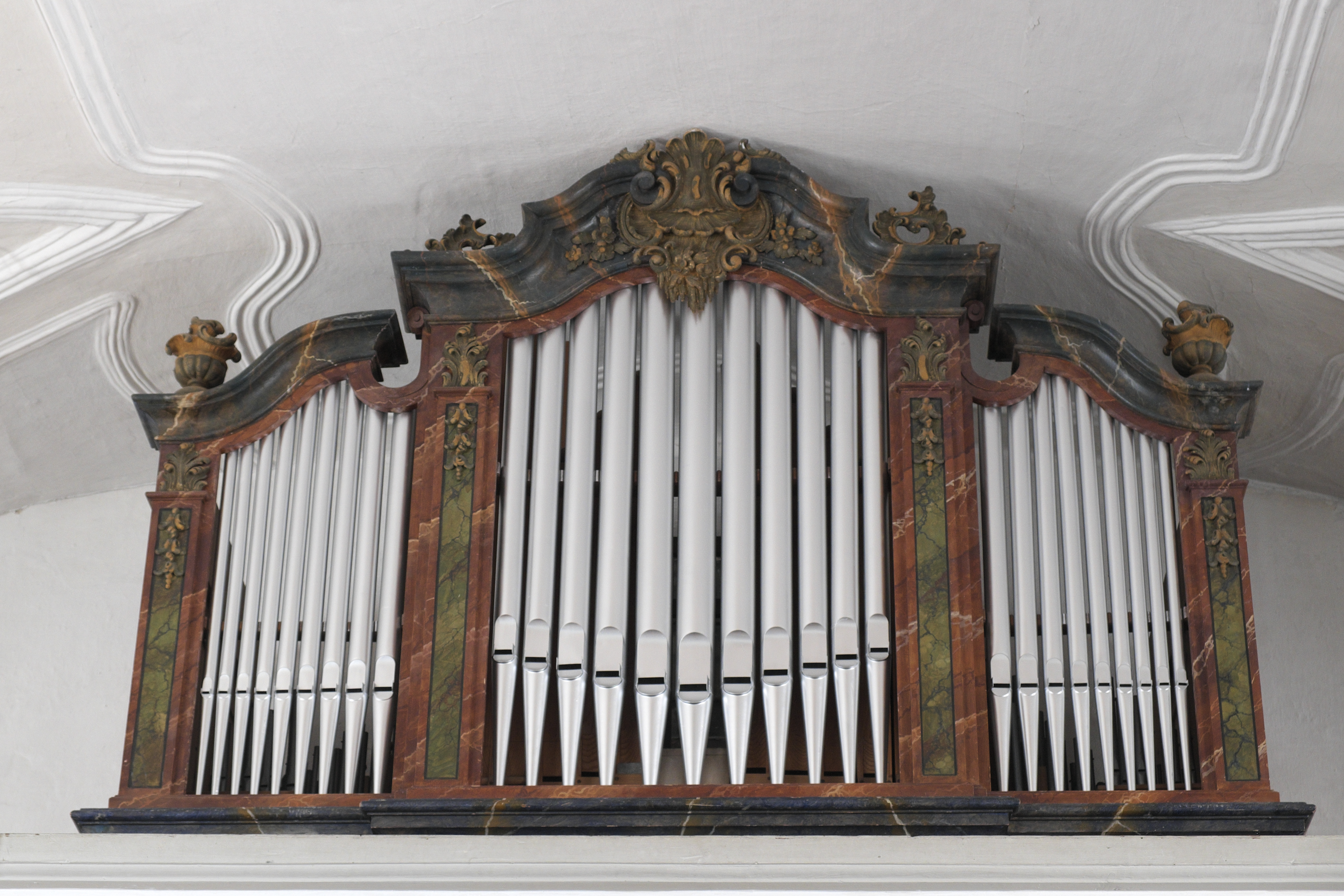 Katholische Filialkirche St. Martin in Niederstraubing (Steinkirchen) im Landkreis Erding (Bayern/Deutschland), Orgel